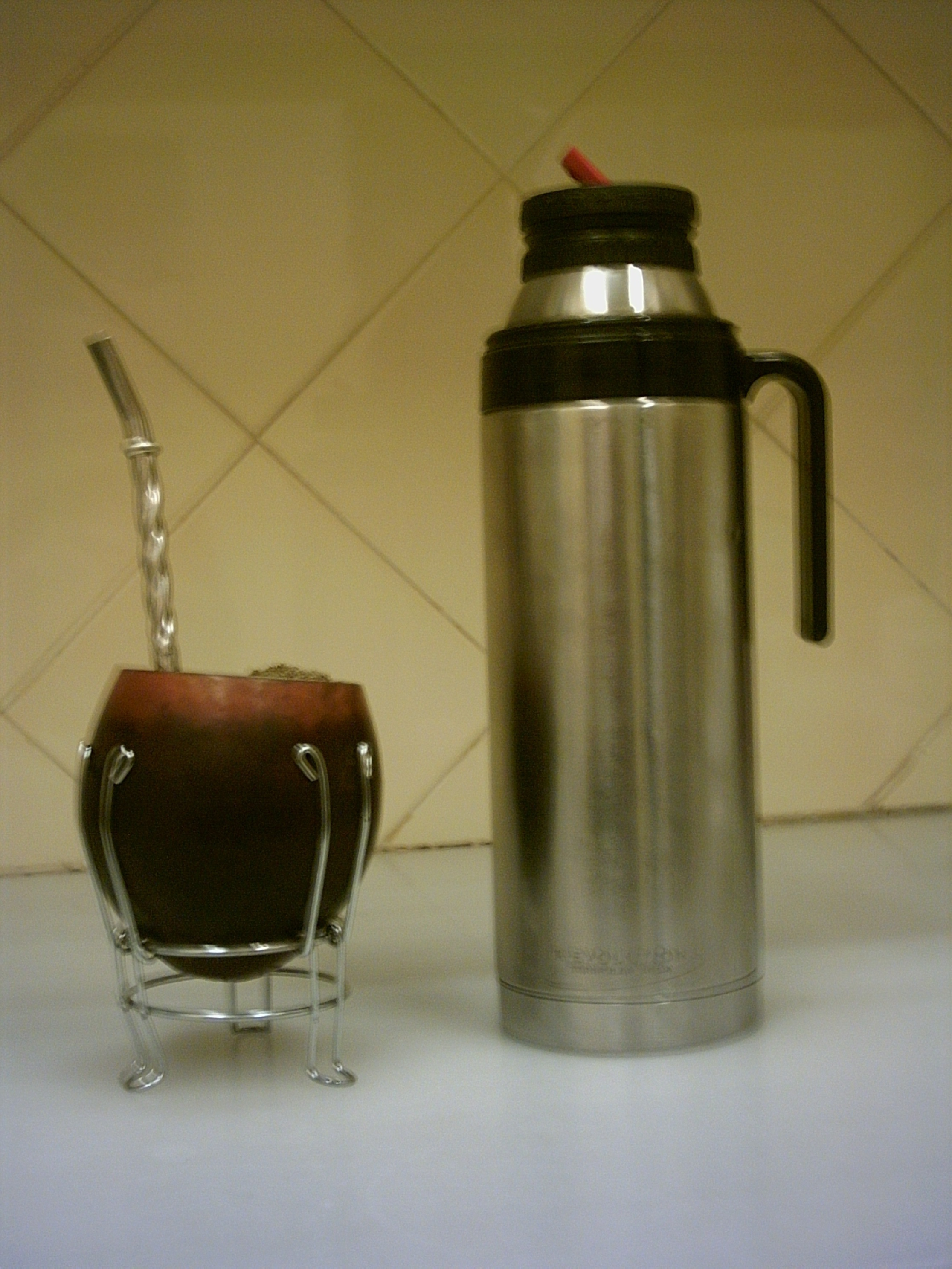 Termo acompañado del típico mate uruguayo en forma de calabacín ahuecado con una bombilla metálica.